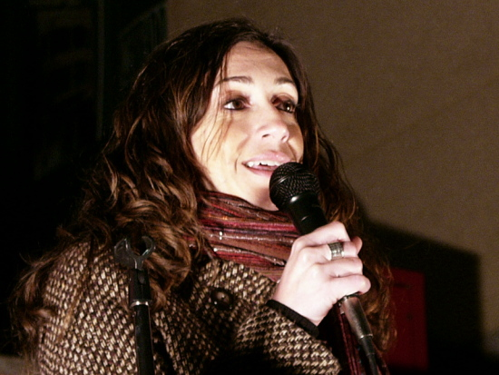 valencian politician Isaura Navarro campaigning in Torrent